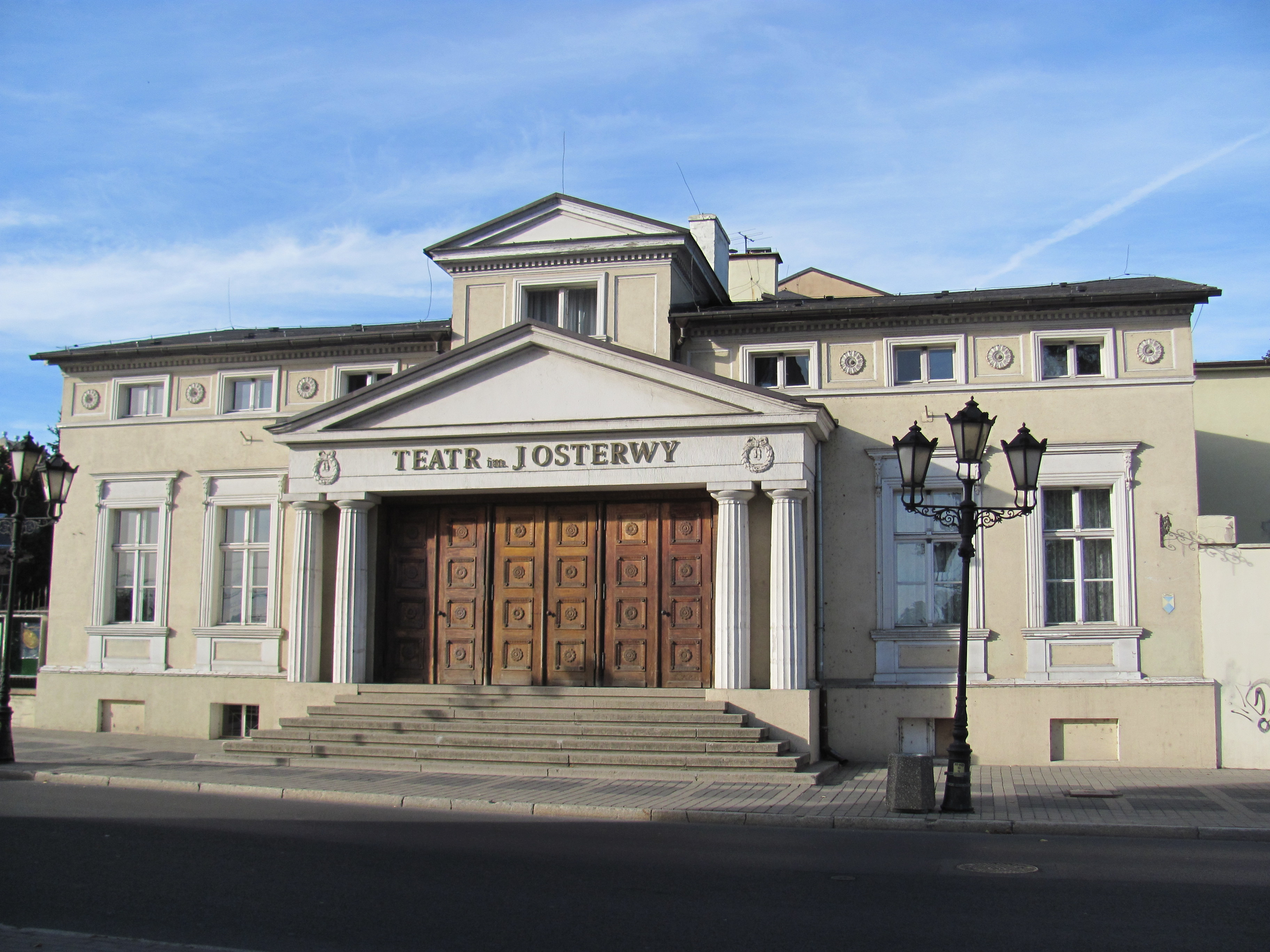 Teatr Juliusza Osterwy w Gorzowie Wielkopolskim